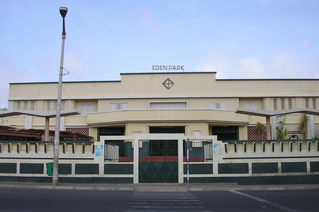 "Eden Park" old cinema in Mindelo, São Vicente island, Cape Verde